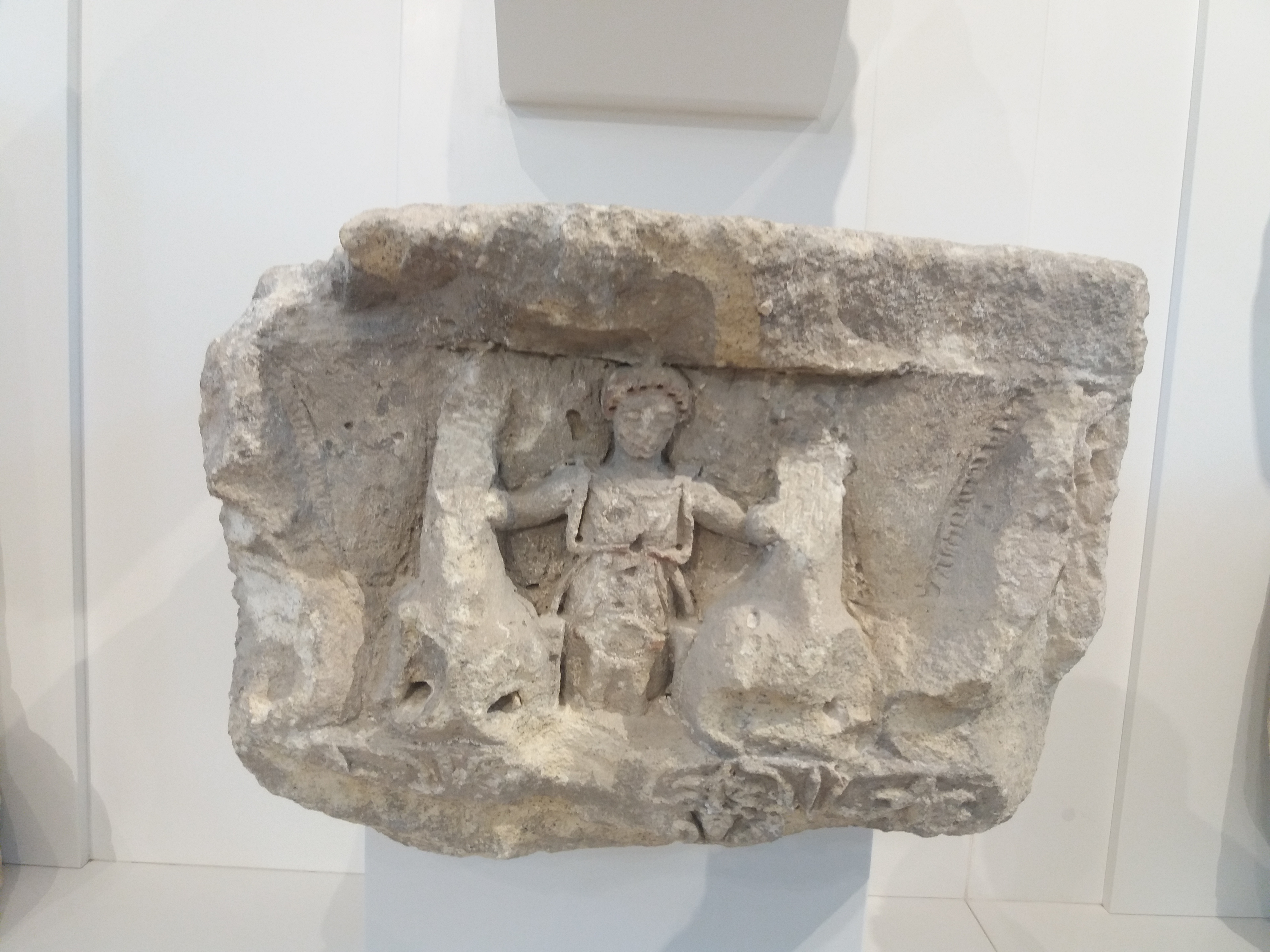 Архитектурная деталь с рельефным изображением Девы на квадриге. Известняк. IV-III век до н. э. Херсонесский музей-заповедник. Relief image of Deva (Parthenos) riding in quadriga. Tauric Chersonese. 400-200 BC.